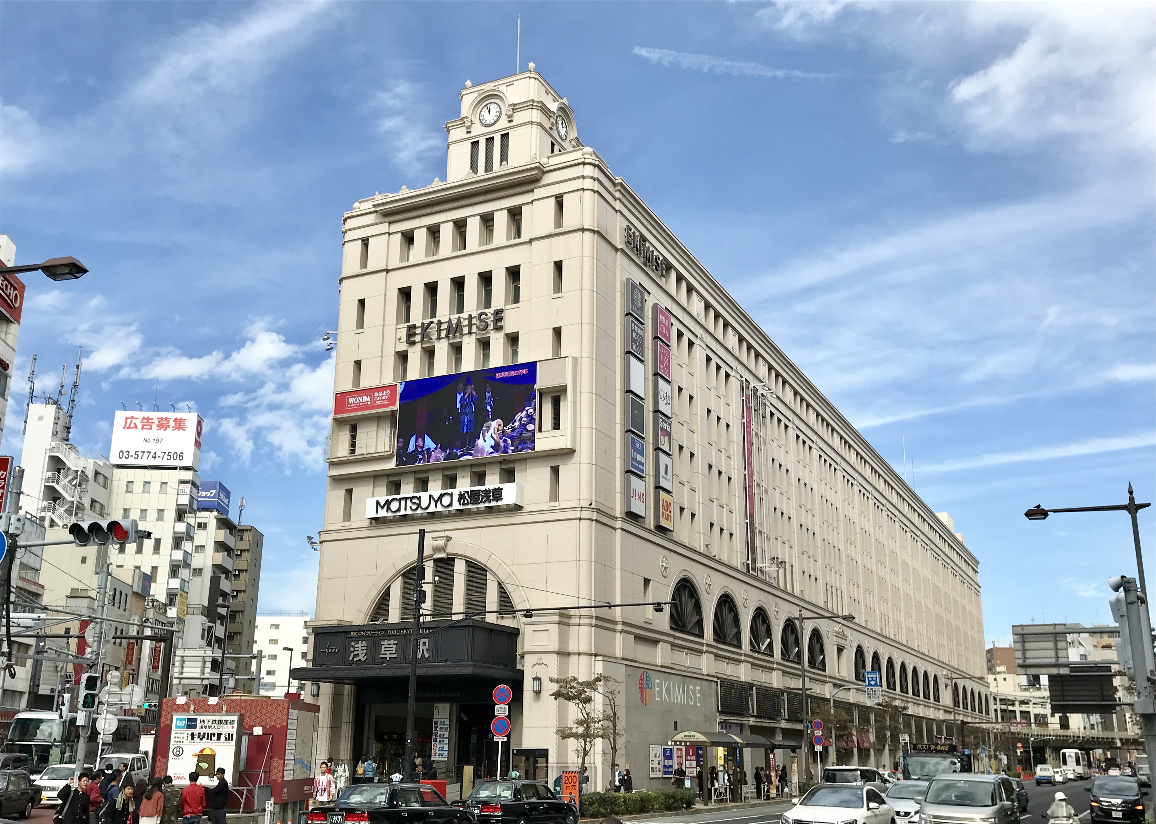 東武スカイツリーライン浅草駅駅舎・松屋浅草